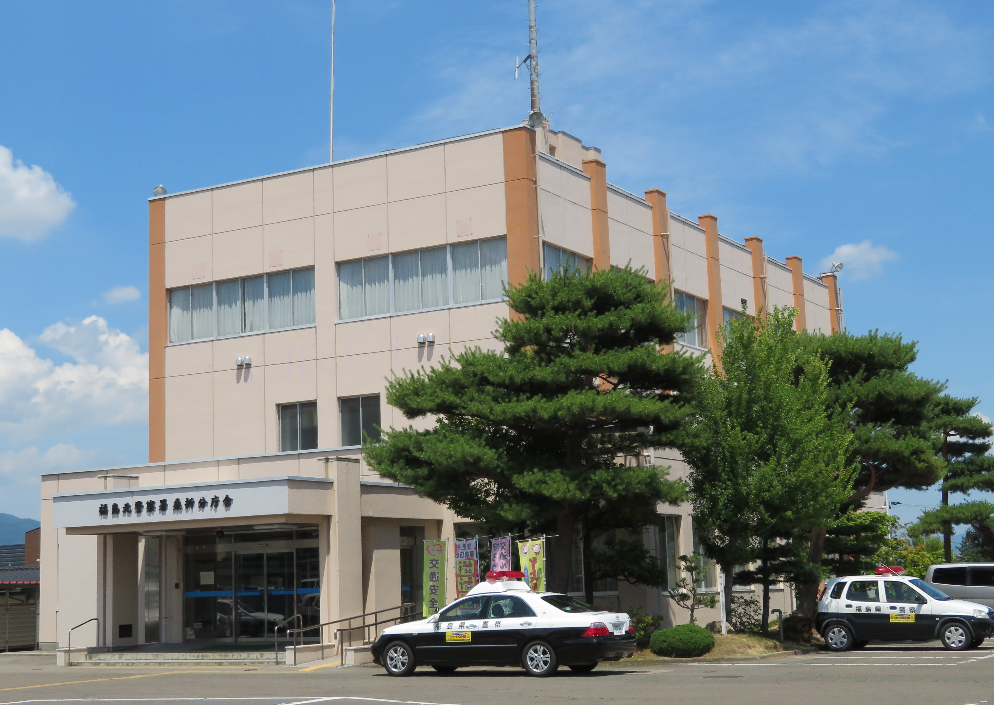 福島北警察署桑折分庁舎（旧桑折警察署庁舎） Canon PowerShot SX720 HS